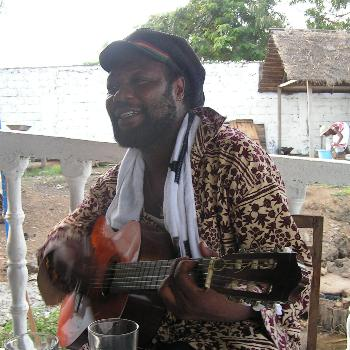 IMPROVISATION